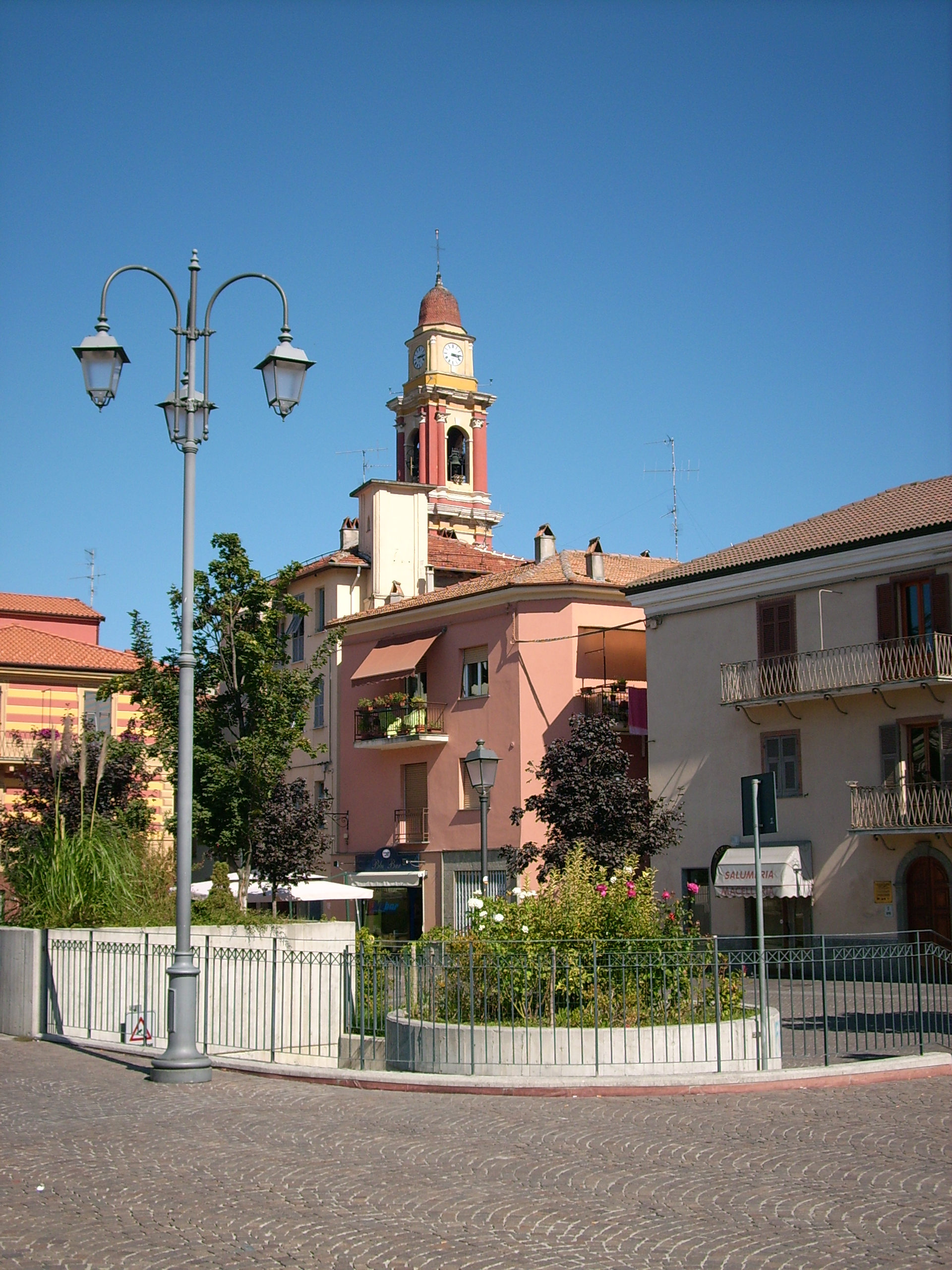 Cairo Montenotte, Liguria, Italia